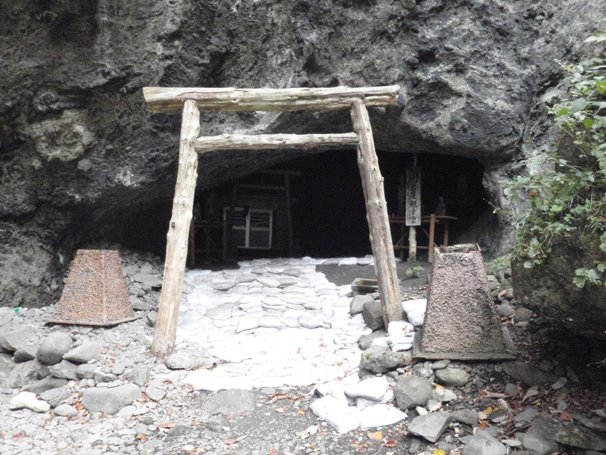 小幌駅から海岸に歩いて約30分、岩屋観音。